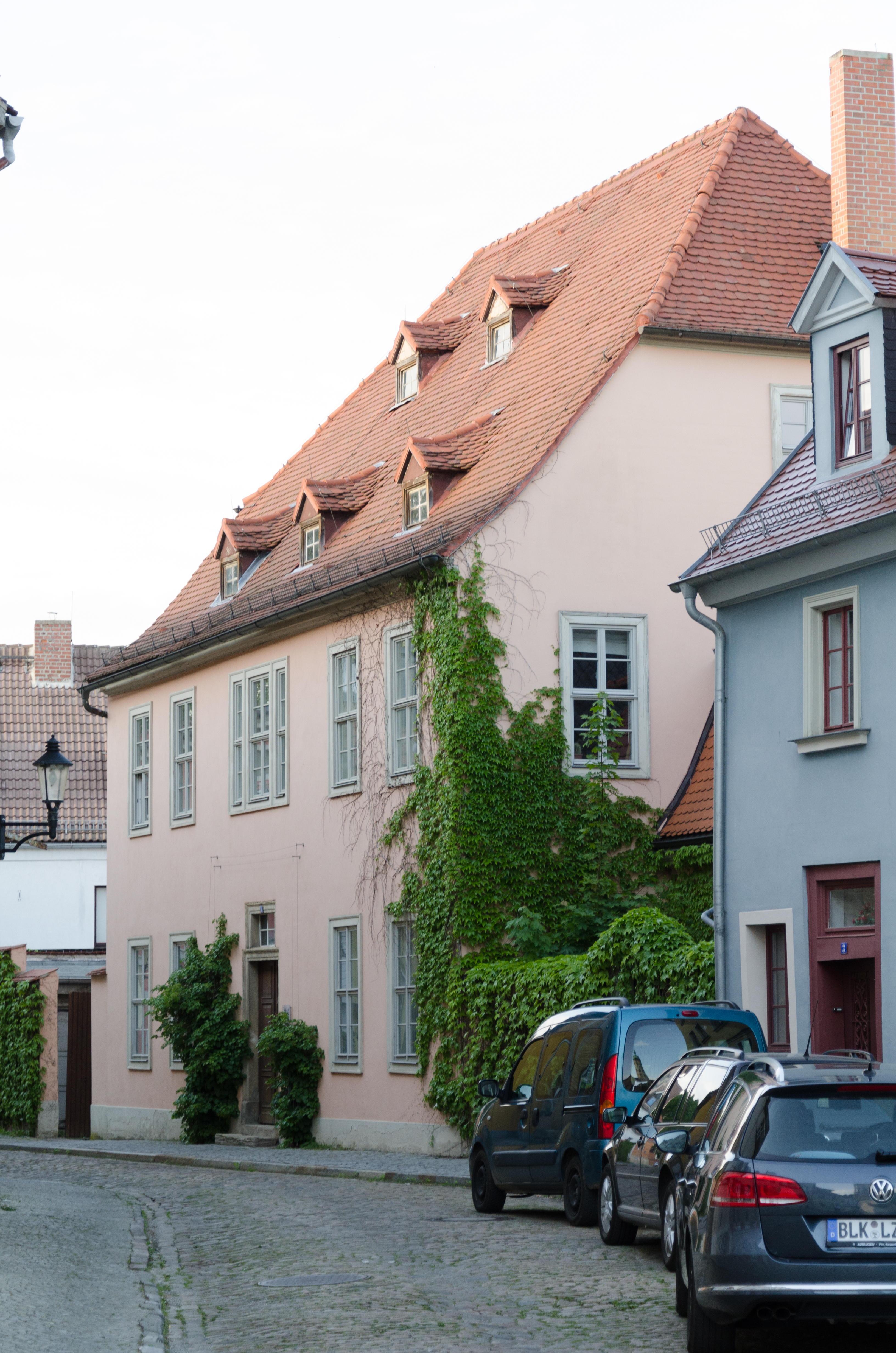 Naumburg, Dompredigergasse 5